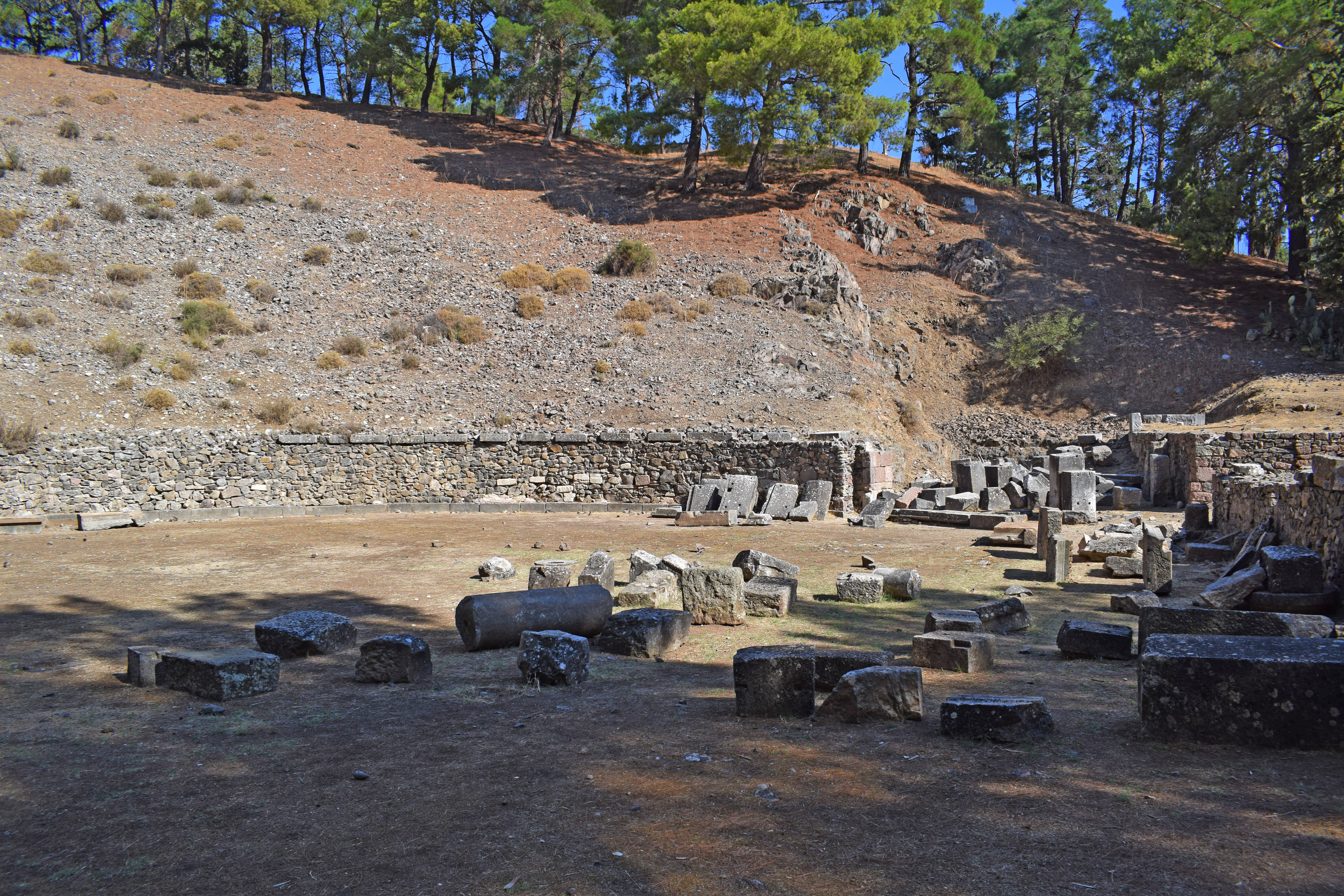 Αρχαίο θέατρο Μυτιλήνης (Ancient Theater of Mytilene)«Αρχαίο θέατρο Μυτιλήνης»